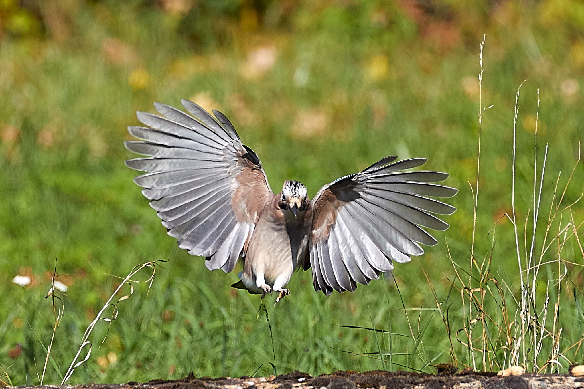 Eichelhäher beim Anflug auf eine Steinmauer. Dabei sind die Flügel voll ausgebreitet und man hat einen Blick auf die untere Flügelpracht. Weiterhin ist der Eichelfäher ausgestreckt und kann den vorderen Bauchbereich sehen.